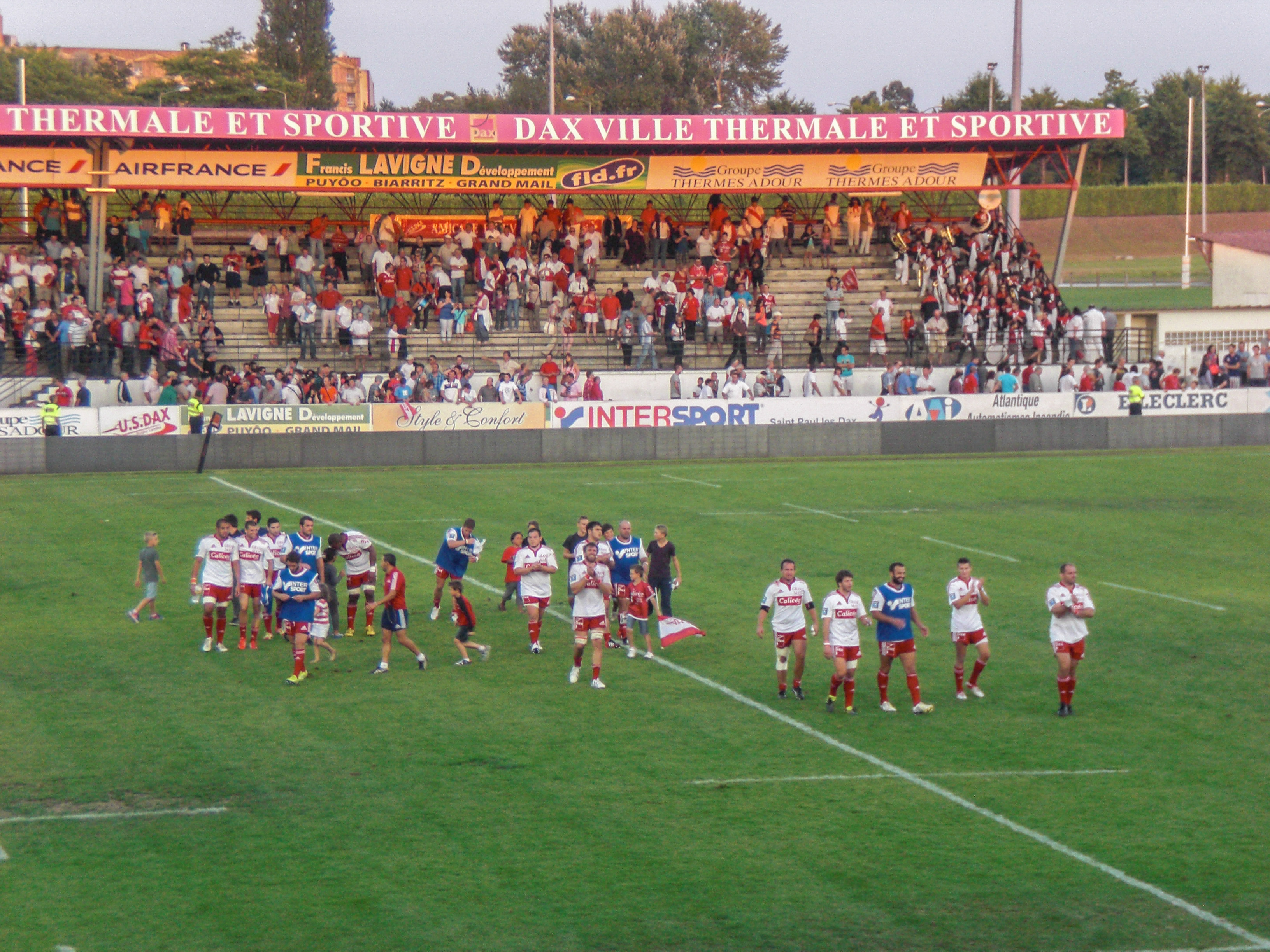 Pro D2 2013-2014 — 31 August 2013, Stade Maurice-Boyau. Match between: US Dax — Colomiers rugby